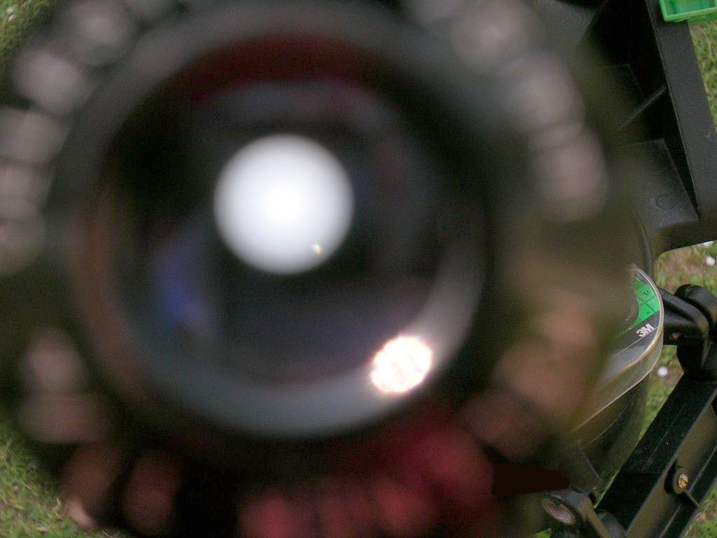 Okular (C8-Teleskop) und Venus